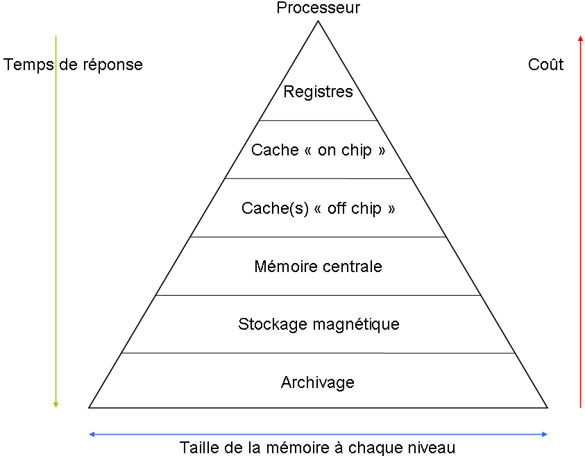 Titre : Hiérarchie memoire.